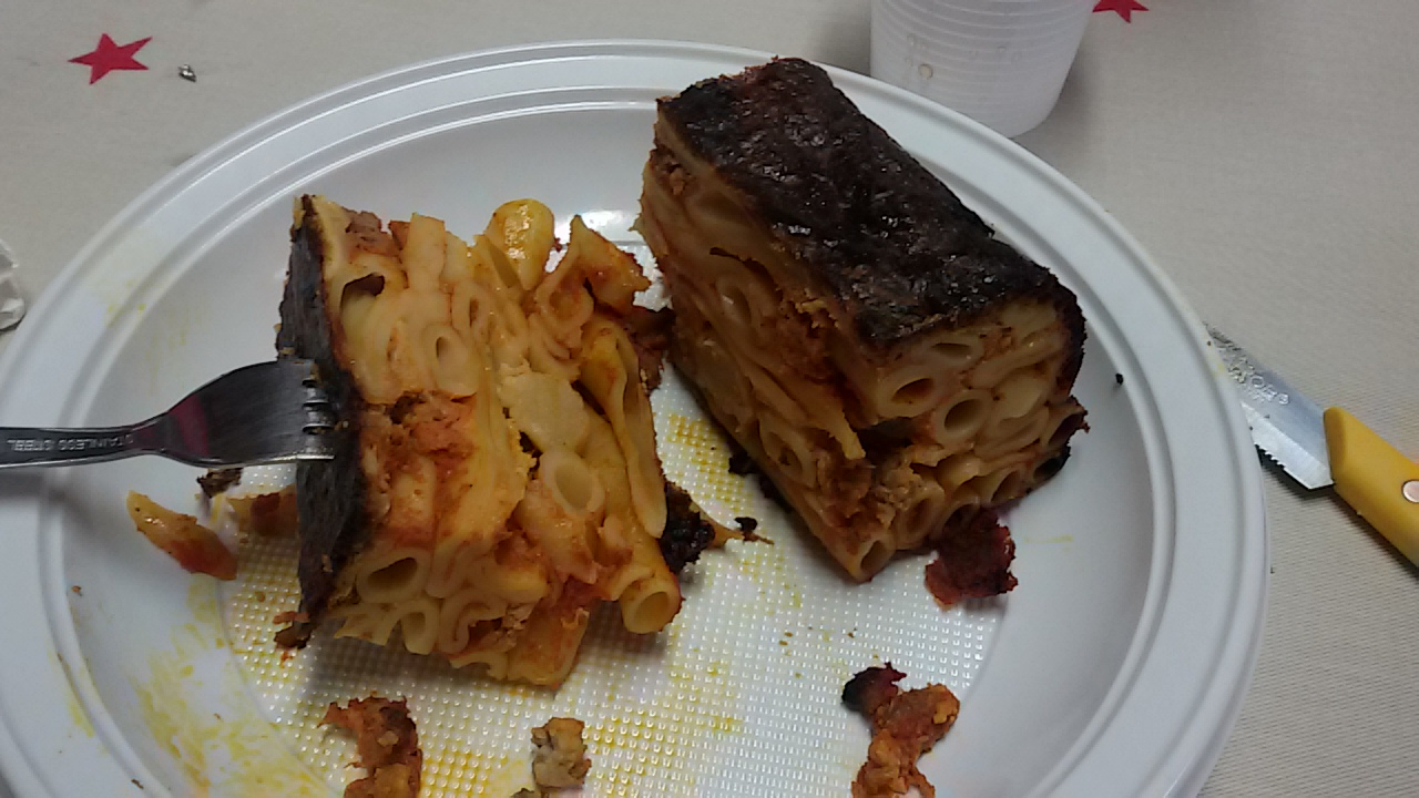 mpurnato di Campobello di Licata